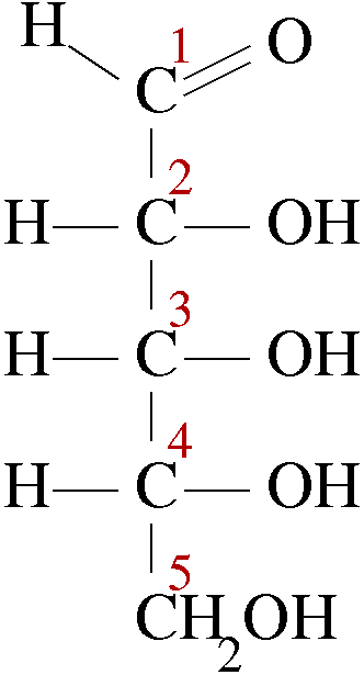 Aldose sugar.